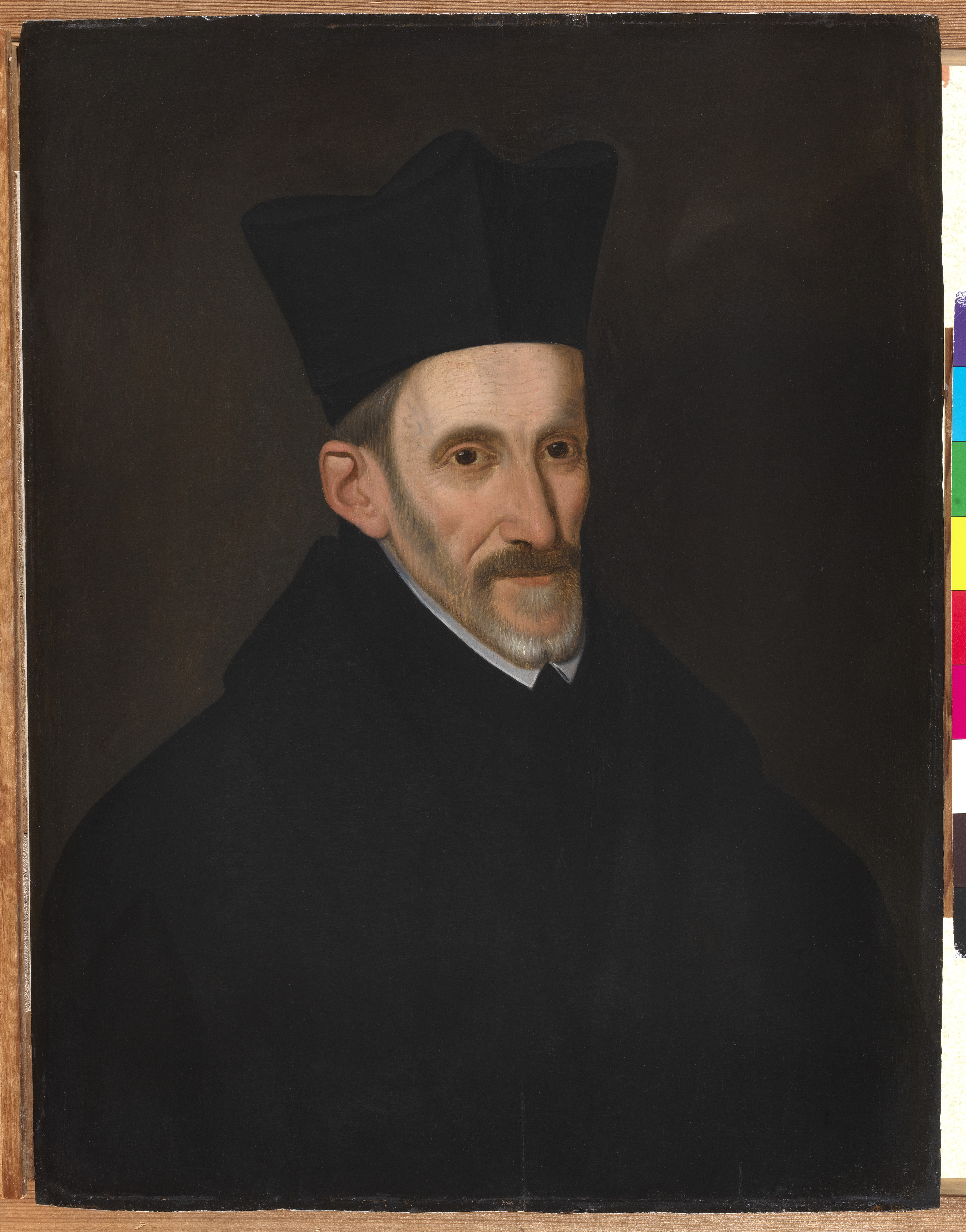 schilderij ( Museum Plantin-Moretus